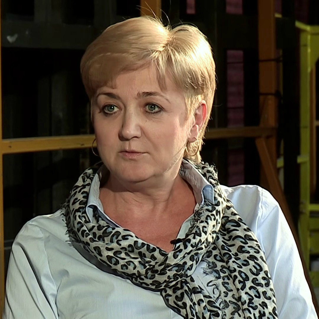 Barbara Włodarczyk, dziennikarka.